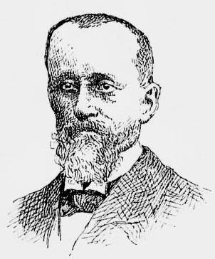 "M. Krantz"